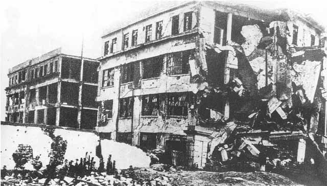 “一·二八”事变中，被日军轰炸后的上海商务印书馆